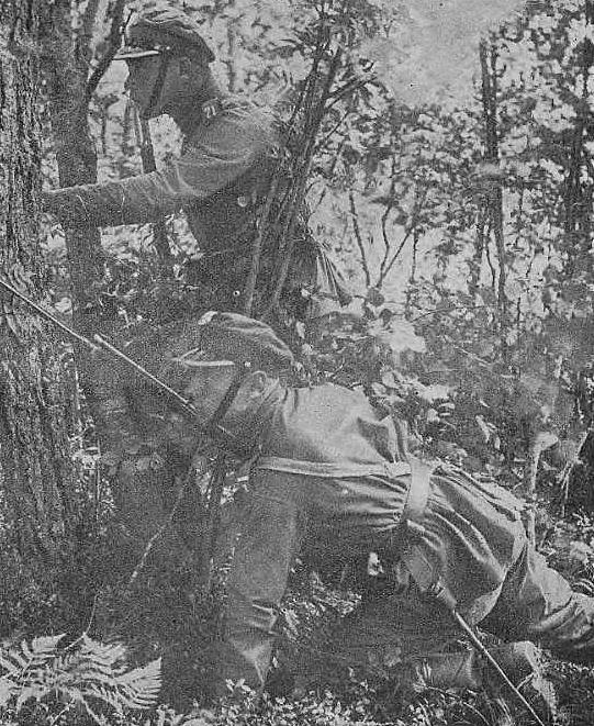 żołnierze KOP (1926-27)